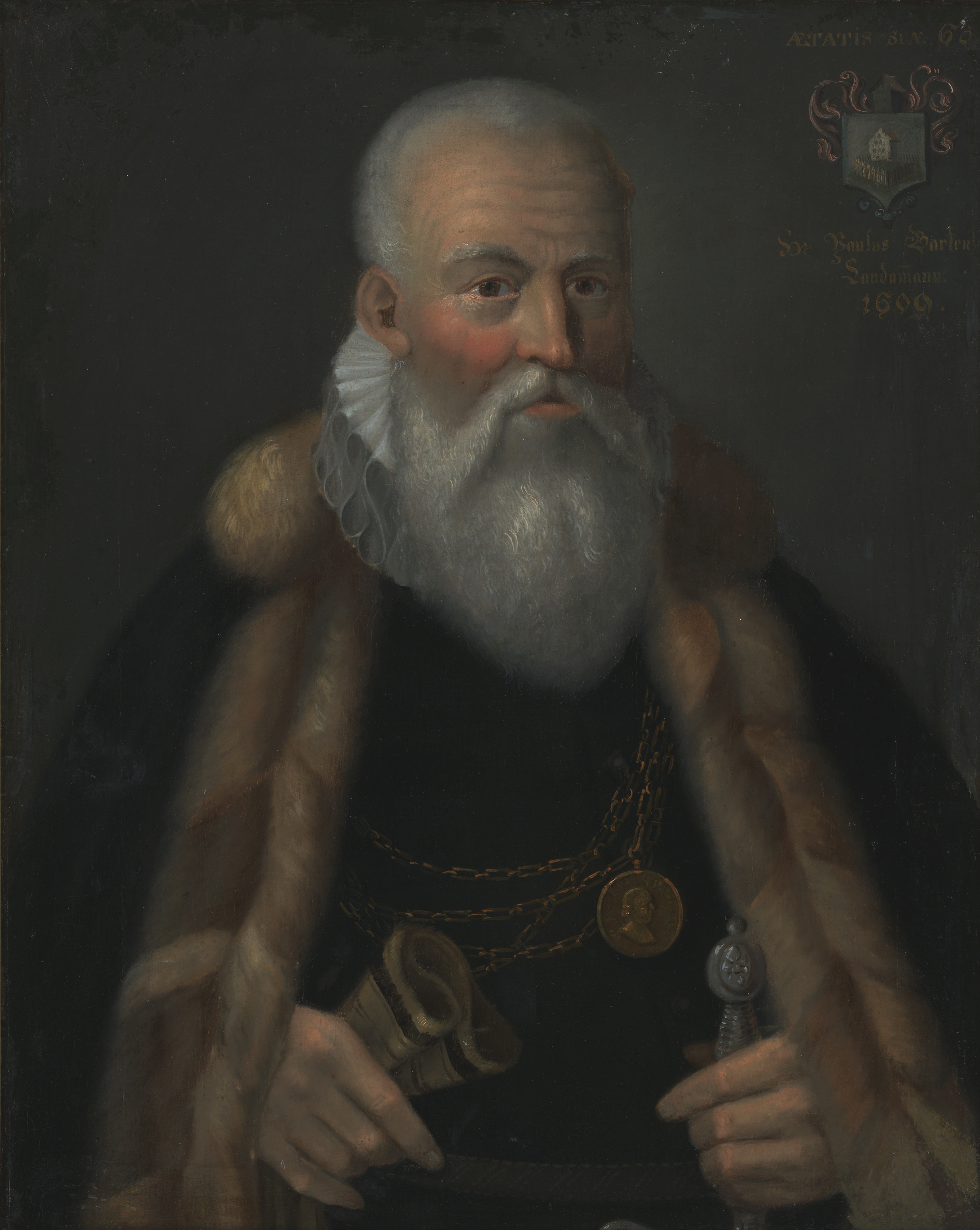 1. Landammann von Appenzell Ausserrhoden, Brustbildnis